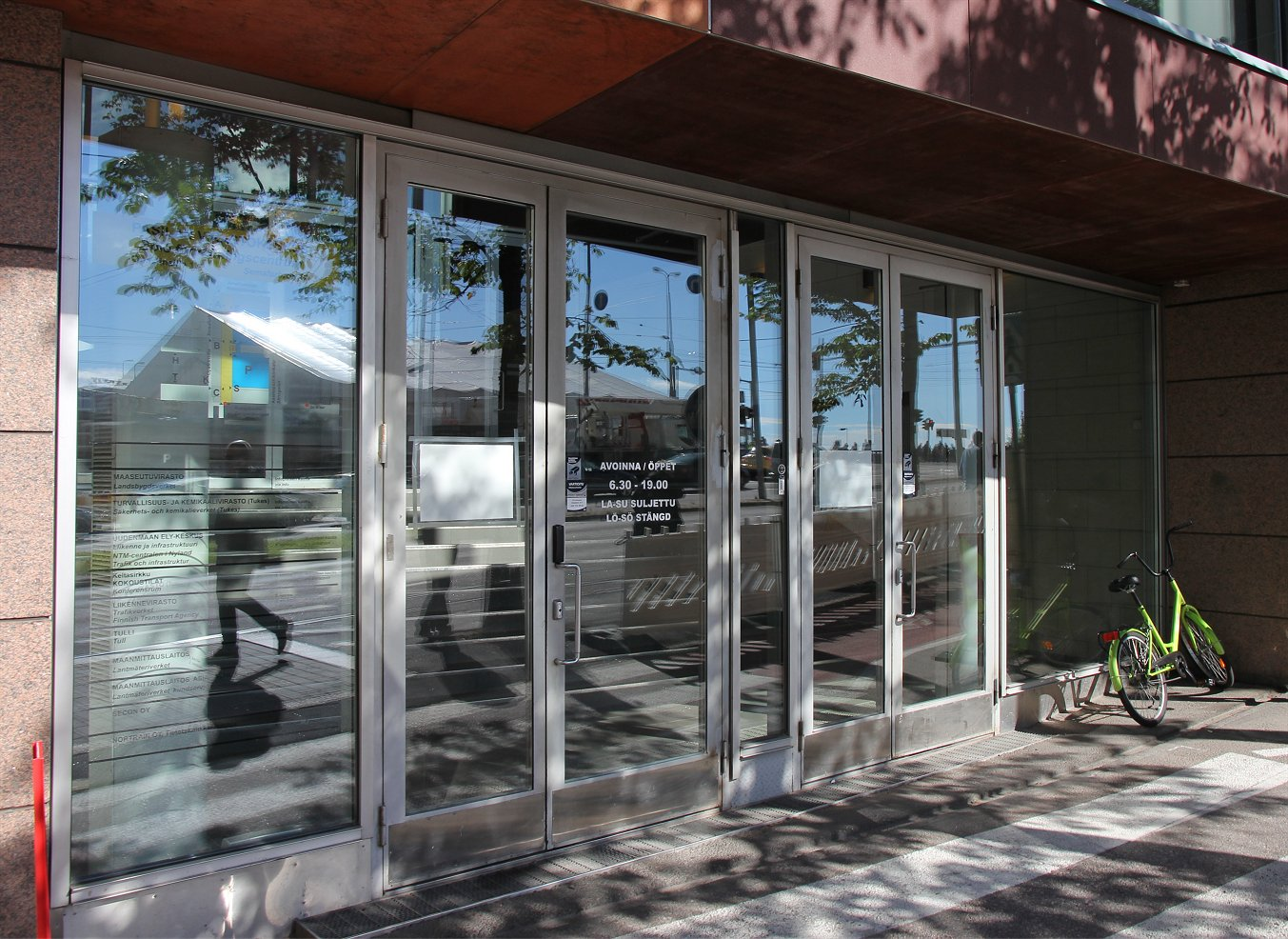 Valtion virastotalon eli Ratapihantie 7:n toimistorakennuksen pääsisäänkäynti Helsingin Pasilassa. Kesällä 2016 tässä Senaatti-kiinteistöjen omistamassa rakennuksessa toimivat muun muassa Maaseutuvirasto, Turvallisuus- ja kemikaalivirasto (Tukes), Uudenmaan ELY-keskus, Liikennevirasto, Tulli, Maanmittauslaitos, Secon Oy ja Nortrain Oy.